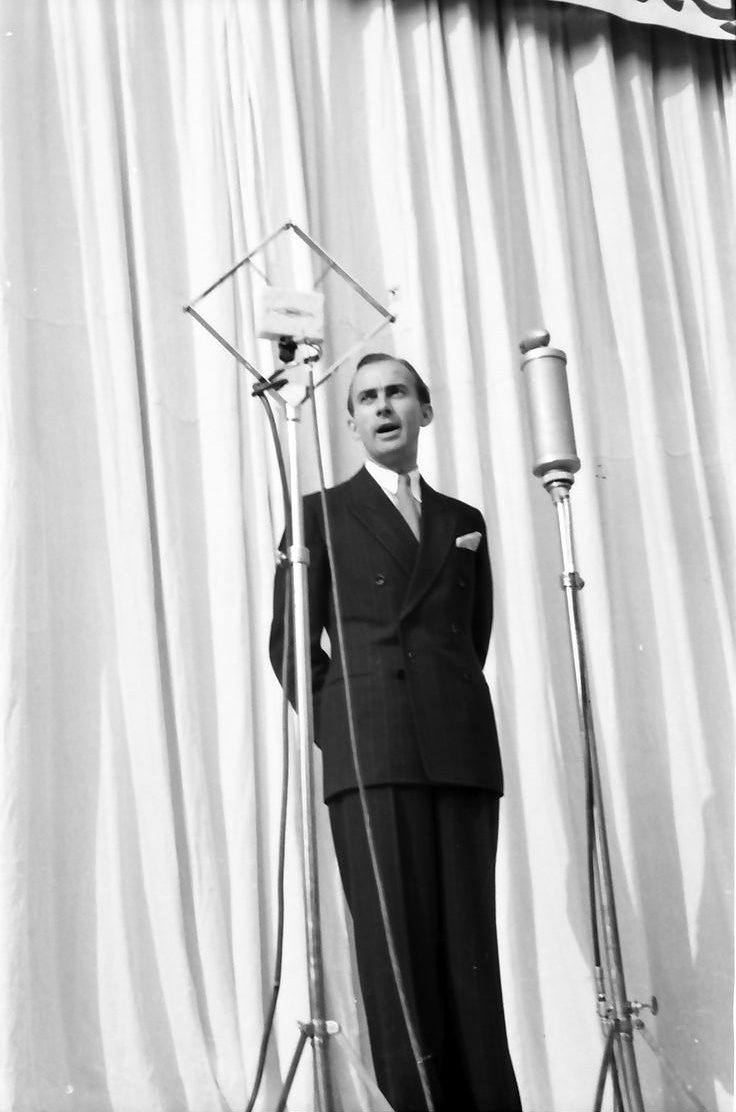 Schloss Güterfelde, Truppenbetreuung: Bob Iller konferiert